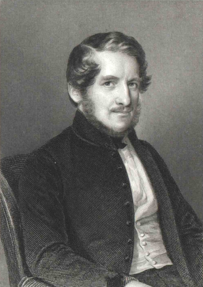 Miklós Barabás (1810–1898) DescriptionHungarian lithographer and painterDate of birth/death22 February 181012 February 1898Location of birth/deathMărcuşa, Covasna, TransylvaniaBudapestWork locationPest (Budapest), Bucureşti (Bucharest)Authority control : Q790148 VIAF: 52010531 ISNI: 0000 0000 7849 6502 ULAN: 500018233 LCCN: n84237705 WGA: BARABÁS, Miklós WorldCat Bajza József (1804–1858) költő